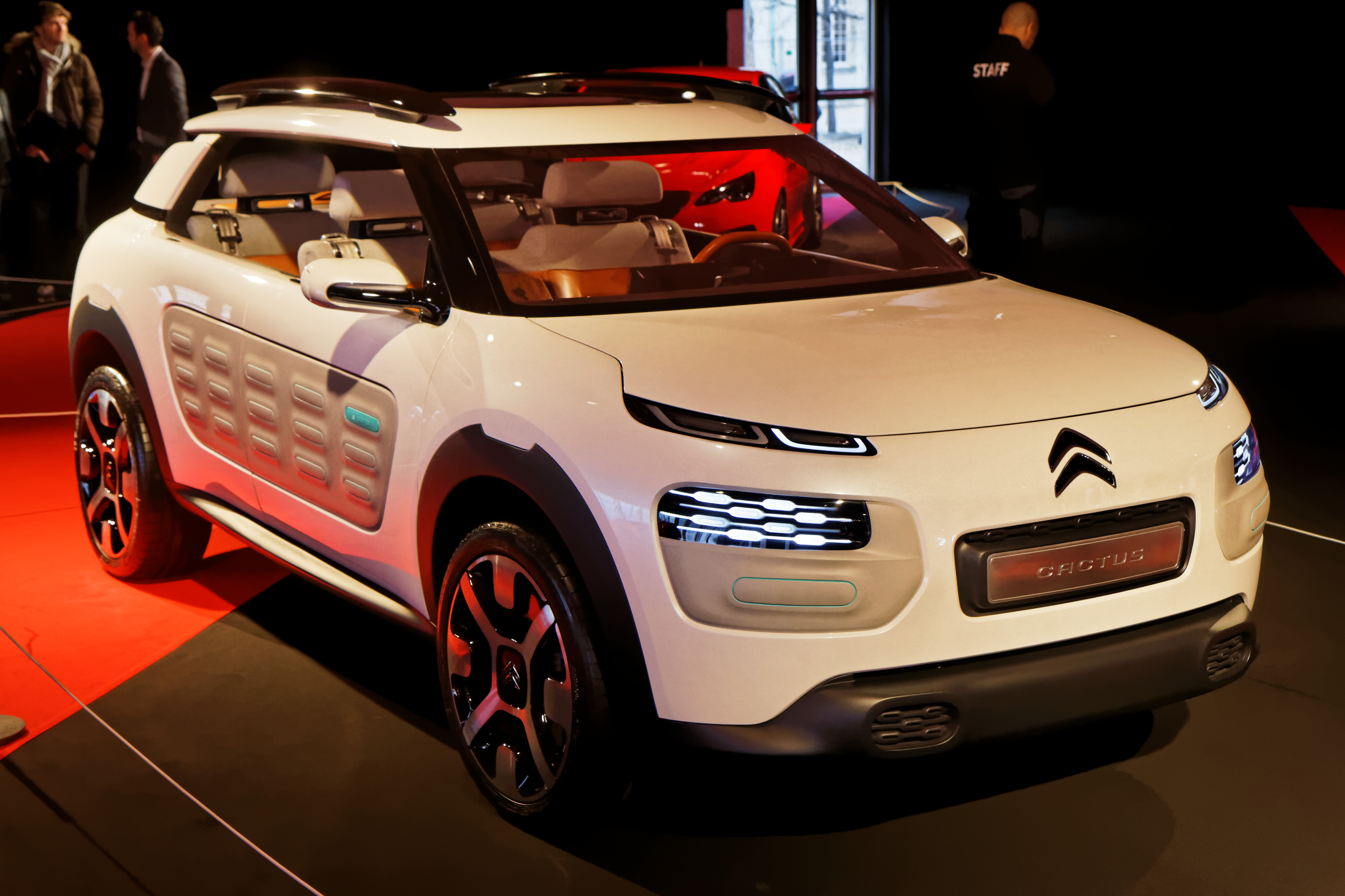 La Citroën C-Cactus exposée lors du festival automobile international 2014.